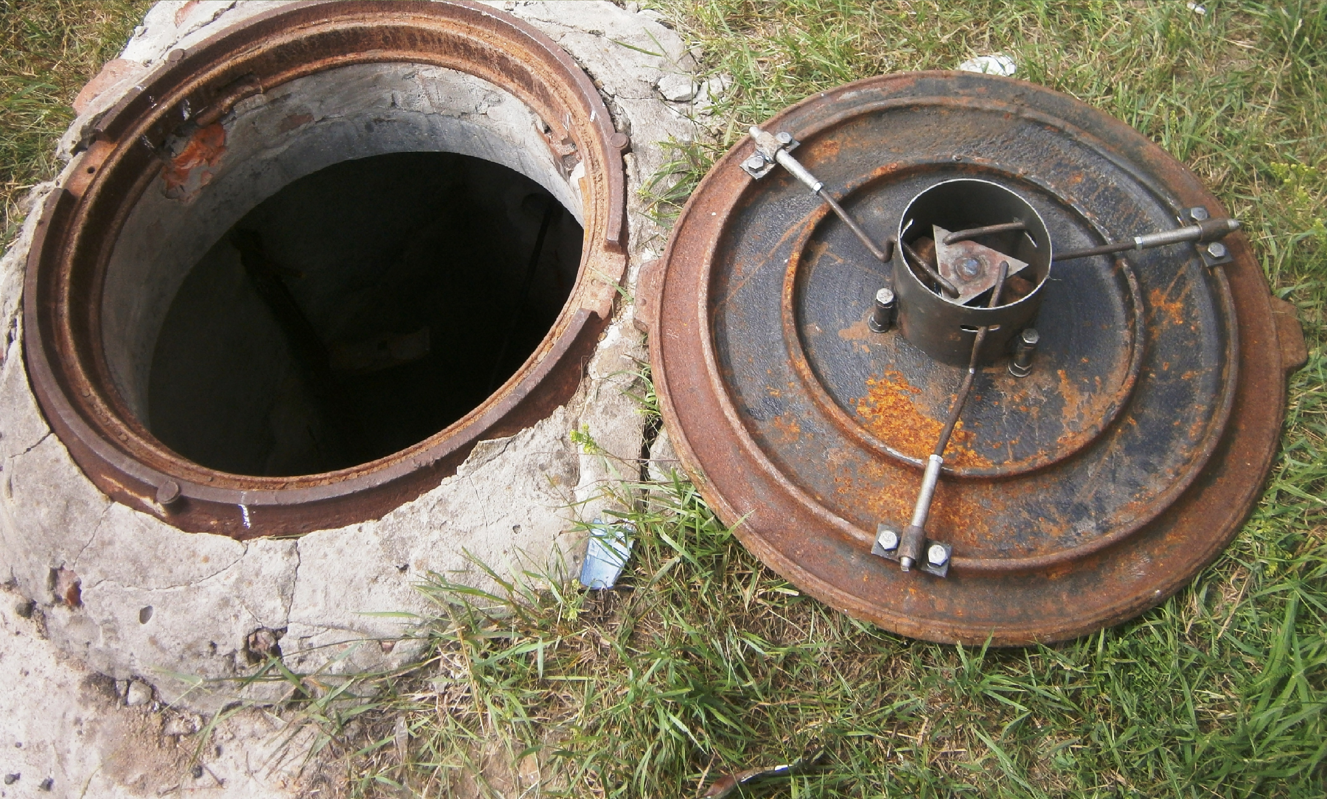 Запірний пристрій для люкі колодязів